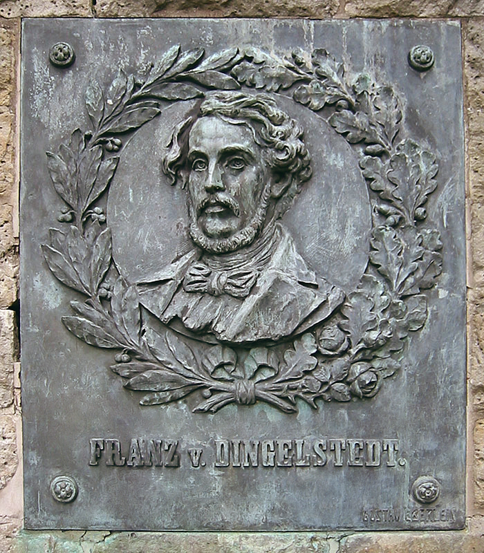 Vom Bildhauer Gustav Eberlein gestaltete Bronzetafel an der Weserliedanlage in der Stadt Hann. Münden. Abgebildet ist der Dichter des Weserliedes, Franz von Dingelstedt.